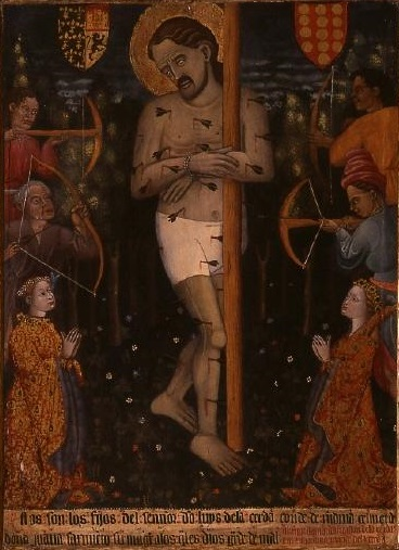 La obra representa el martirio de San Sebastián, y a ambos lados del mártir se hallan los verdugos encargados de ejecutarle y las figuras orantes de don Gastón y doña María de la Cerda, hijos de Luis de la Cerda, el tercer conde de Medinaceli, a los que se alude en la inscripción al pie de la escena. En la parte superior se disponen dos escudos con las armas de la Casa de Medinaceli y de los Sarmiento respectivamente.